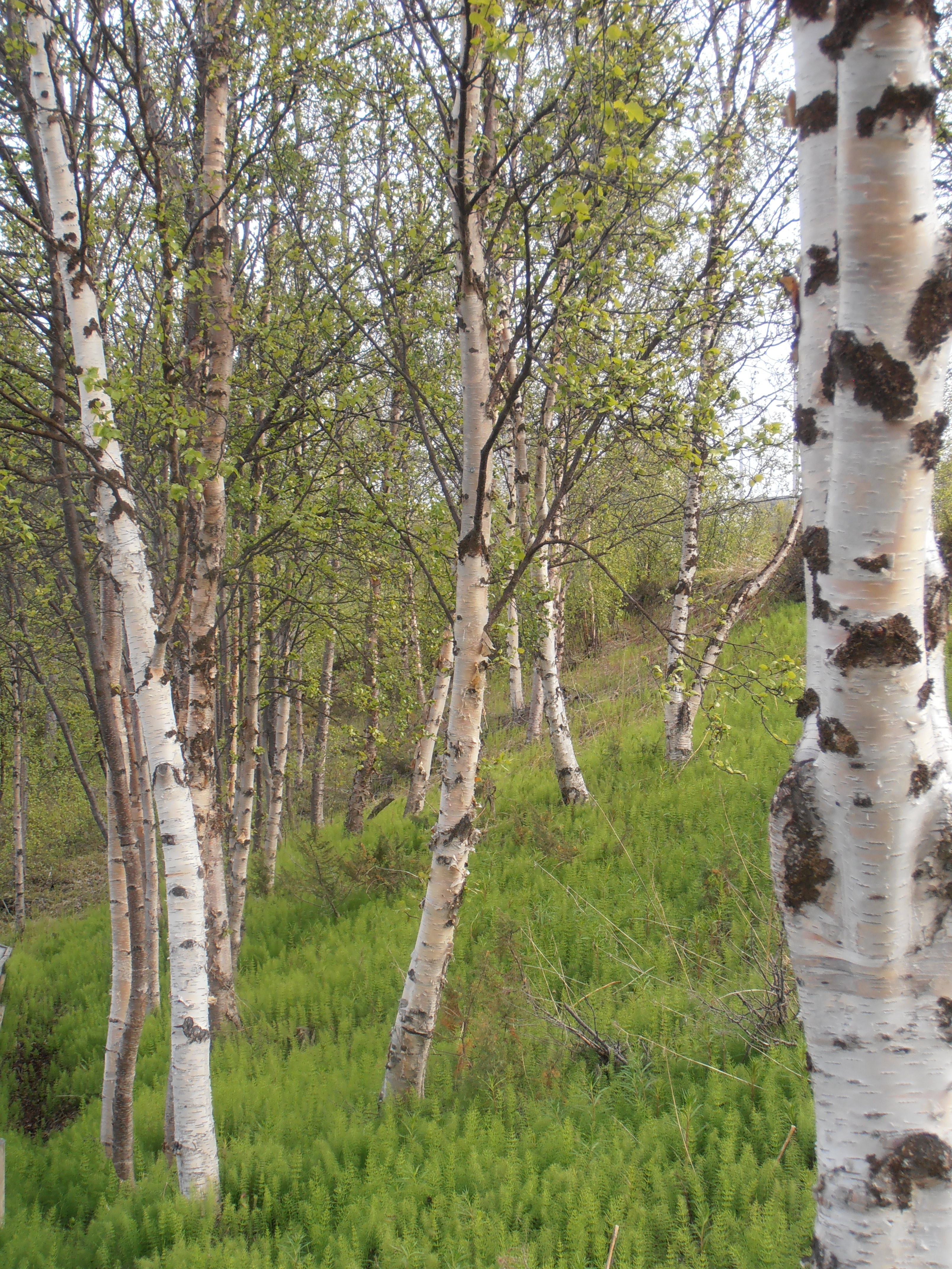 Arbreda que envolta el museu rupestre d'Alta